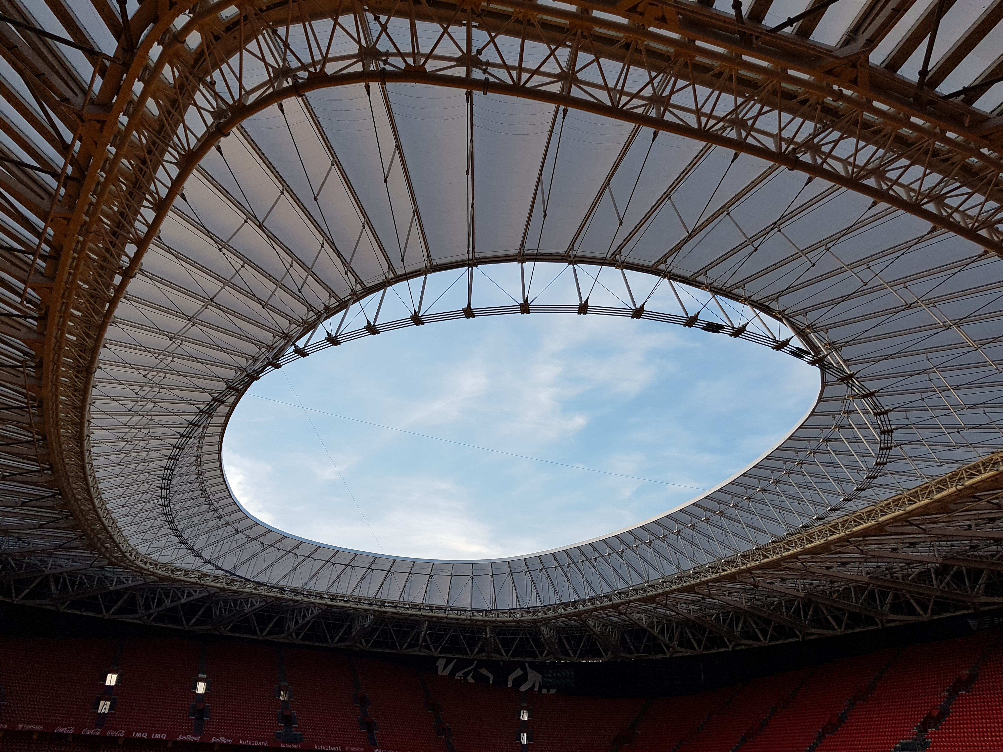 Interior del estadio de San Mamés.